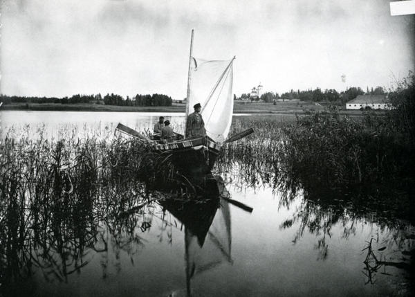 Озеро Селигер Осташковского уезда